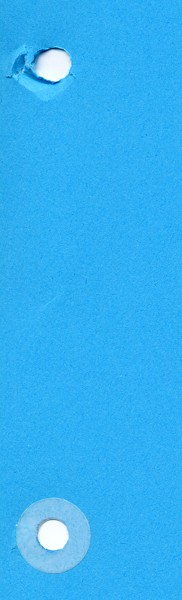 Lochung mit Verstärkerring